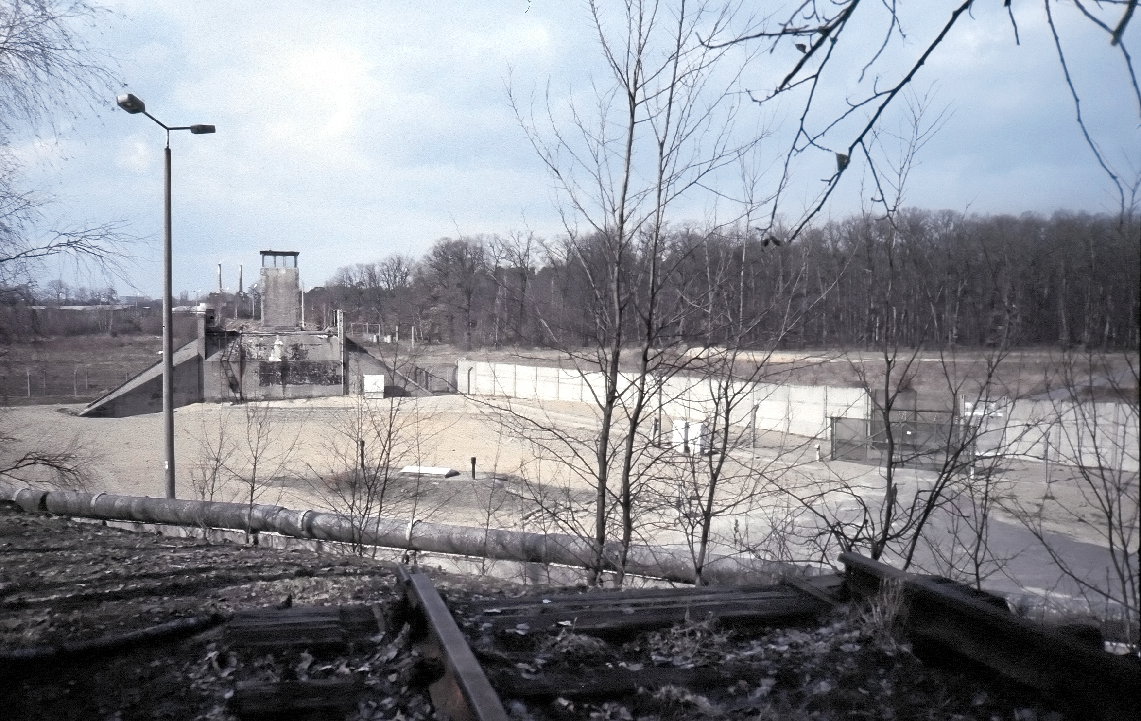 Unterbrochene Kremmener Bahn bei Berlin-Heiligensee